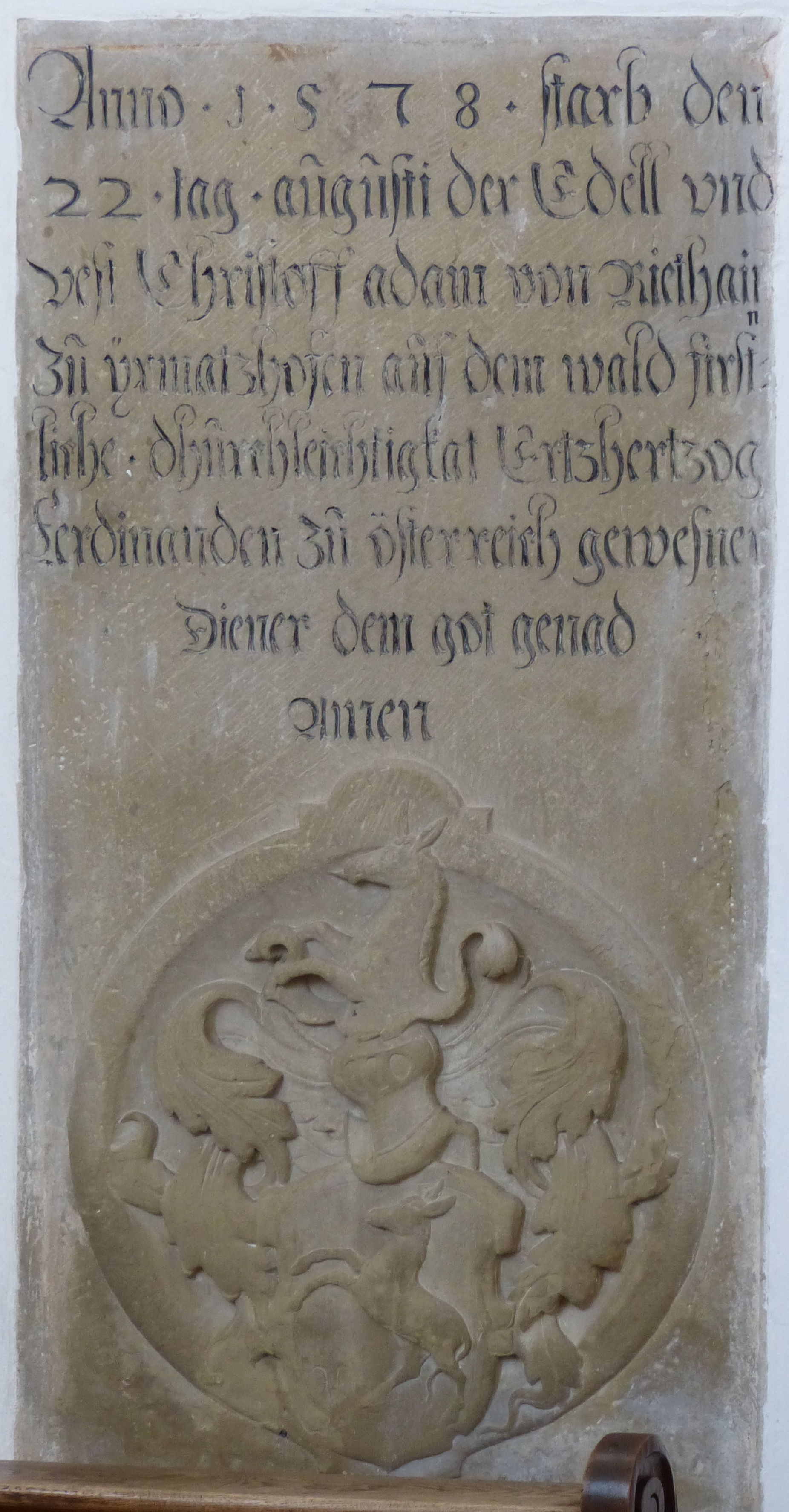 Grabmal von Christoff Adam von Rietheim zu Yrmatzhofen auf dem wald, firstliche durchleichtigkeit Ertzherzog Ferdinanden zu Österreich gewesner Diener († 1578)